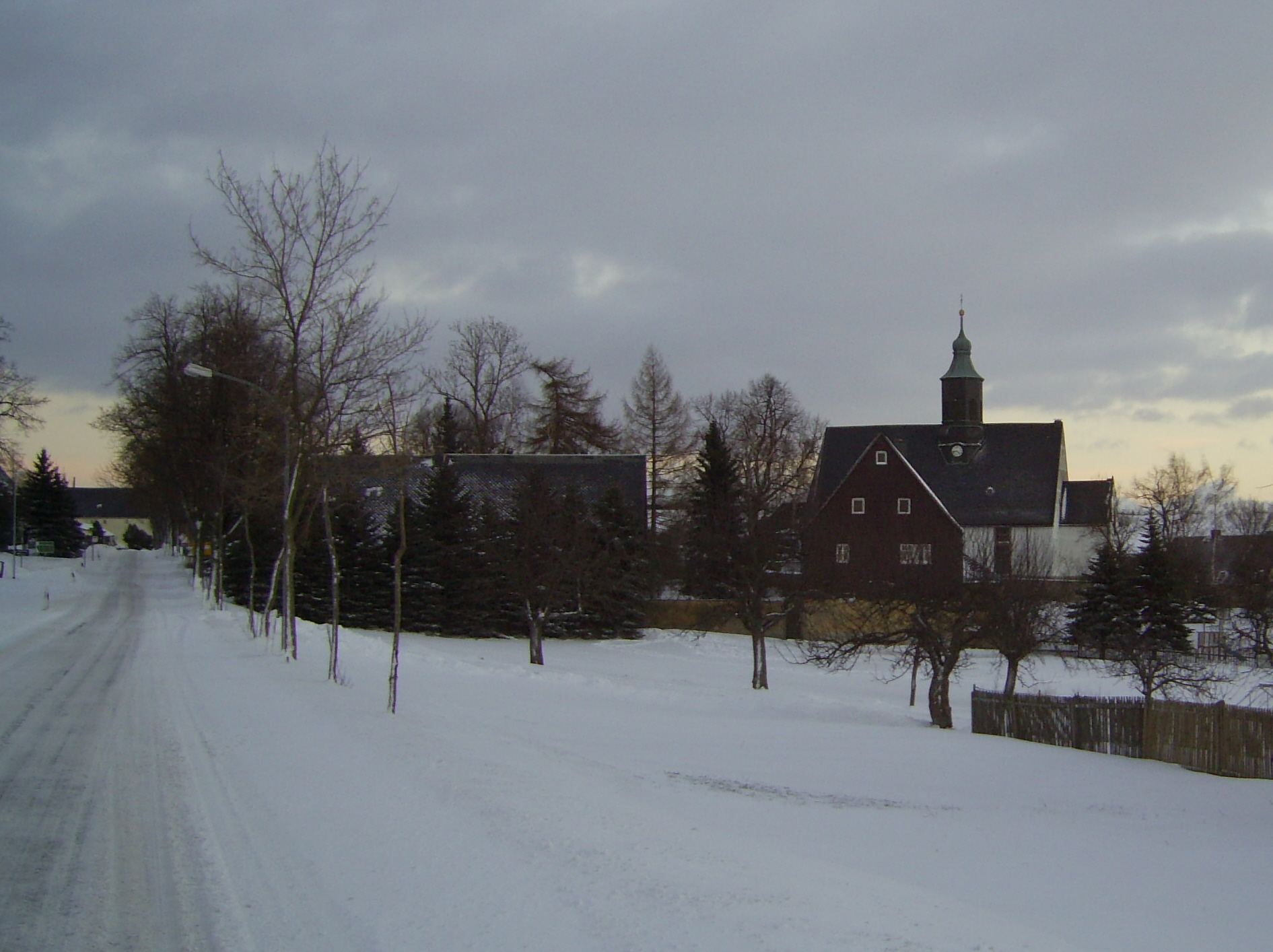 Kirche und Pfarrhaus zu Liebenau (Erzgebirge)